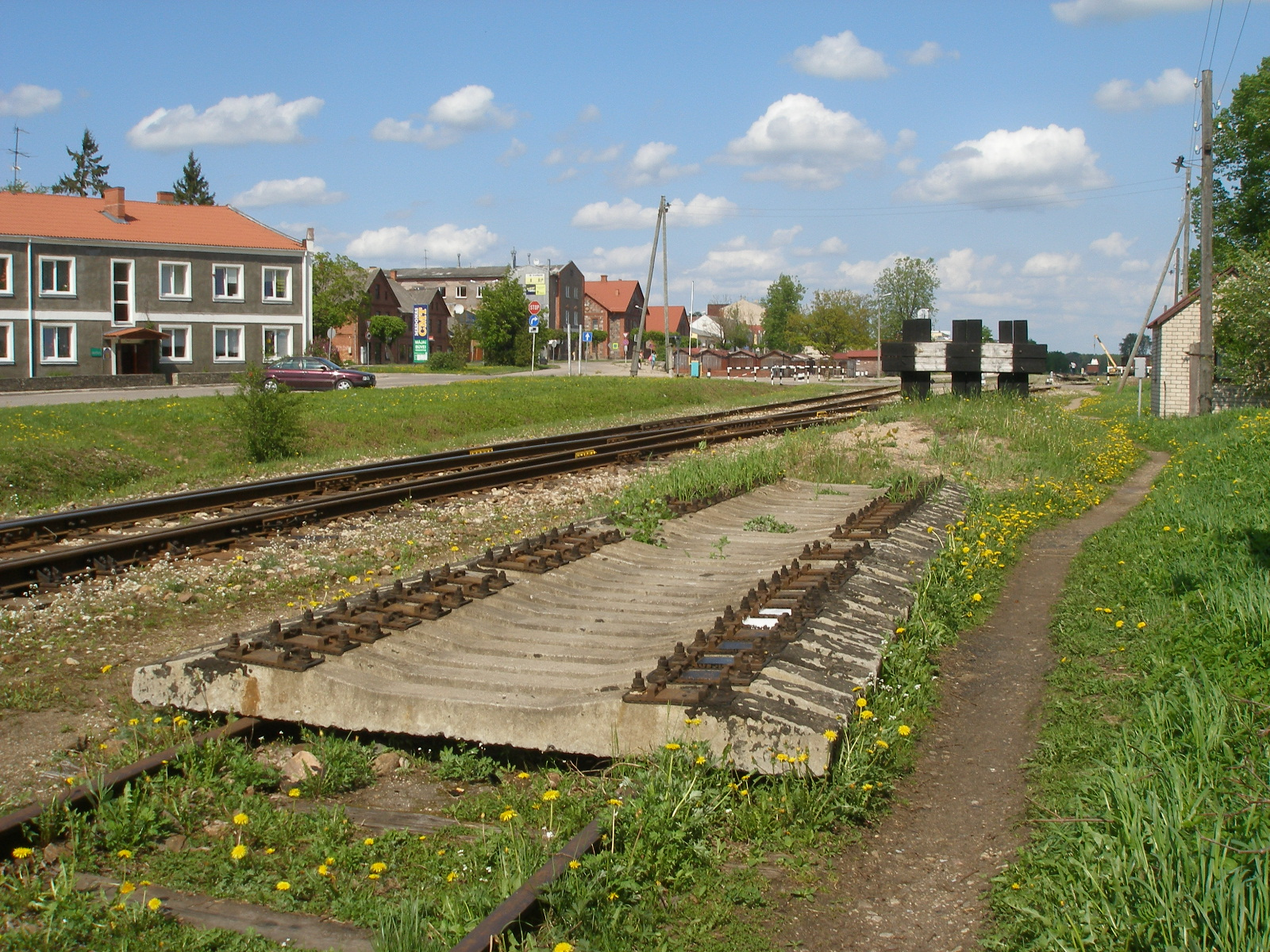 Strupceļš Madonas stacijā.